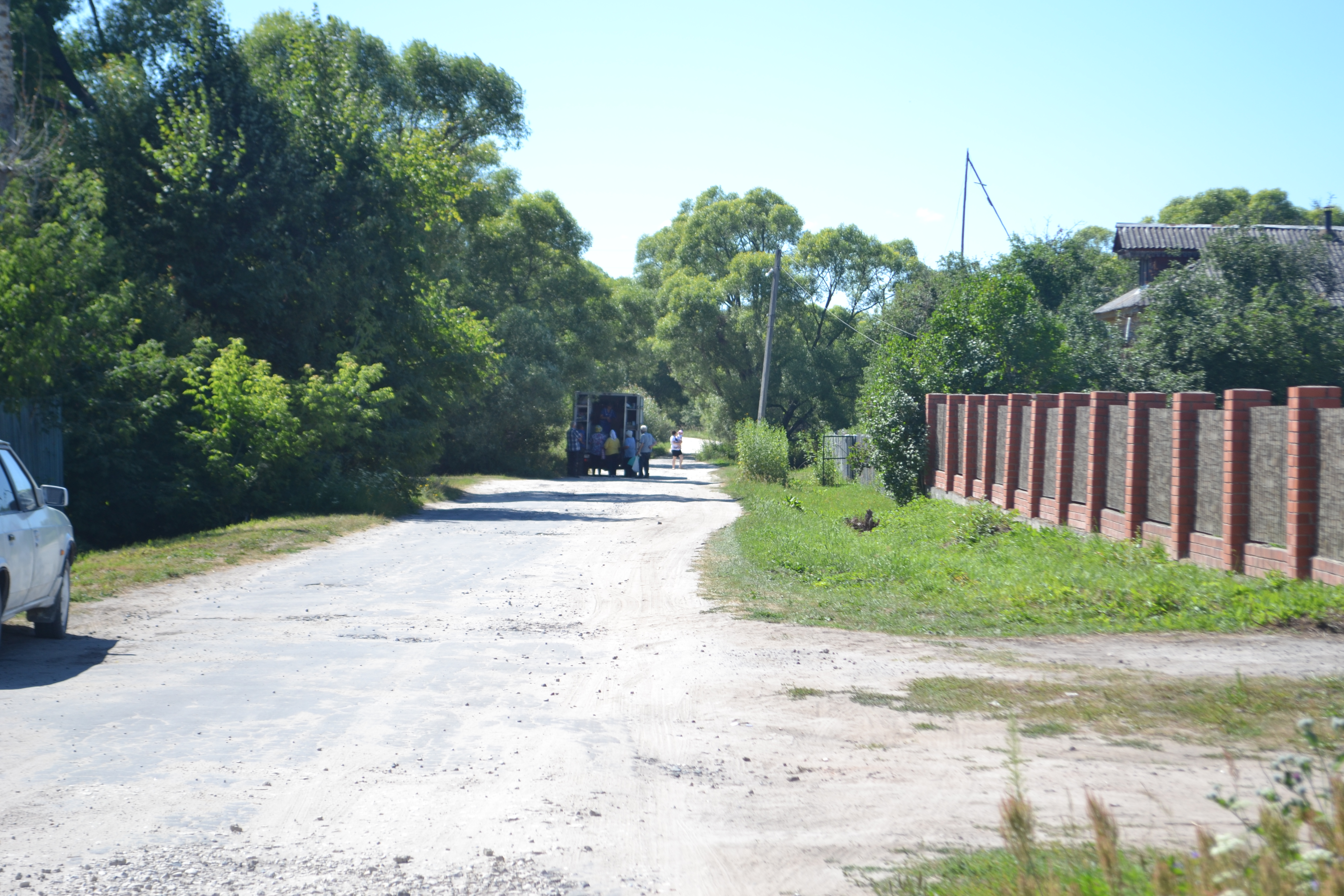 Автолавка в деревне Филисово (Шатурский район)